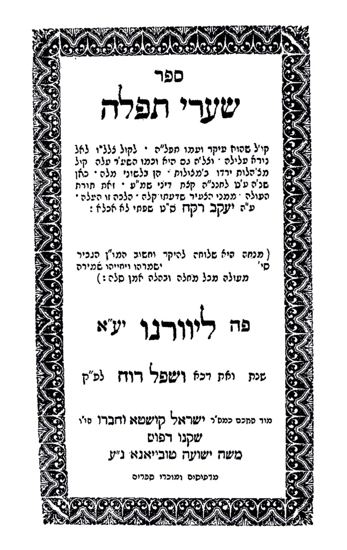 ספר שערי תפילה